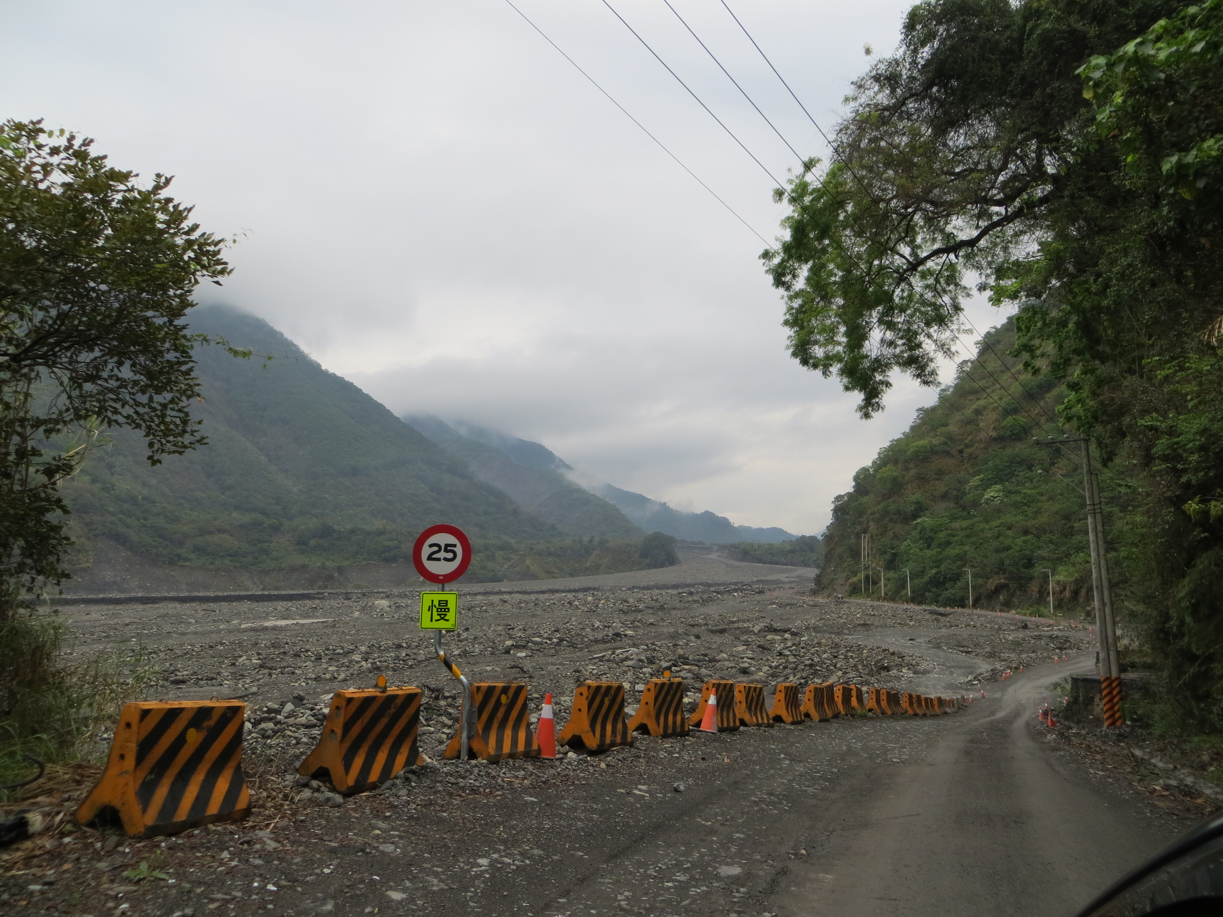 南橫公路過勤和之後，至復興之間為因八八風災而毀損的路段，現以溪底便道搶通此段。此圖攝於頂勤和的正常道、便道轉換點。